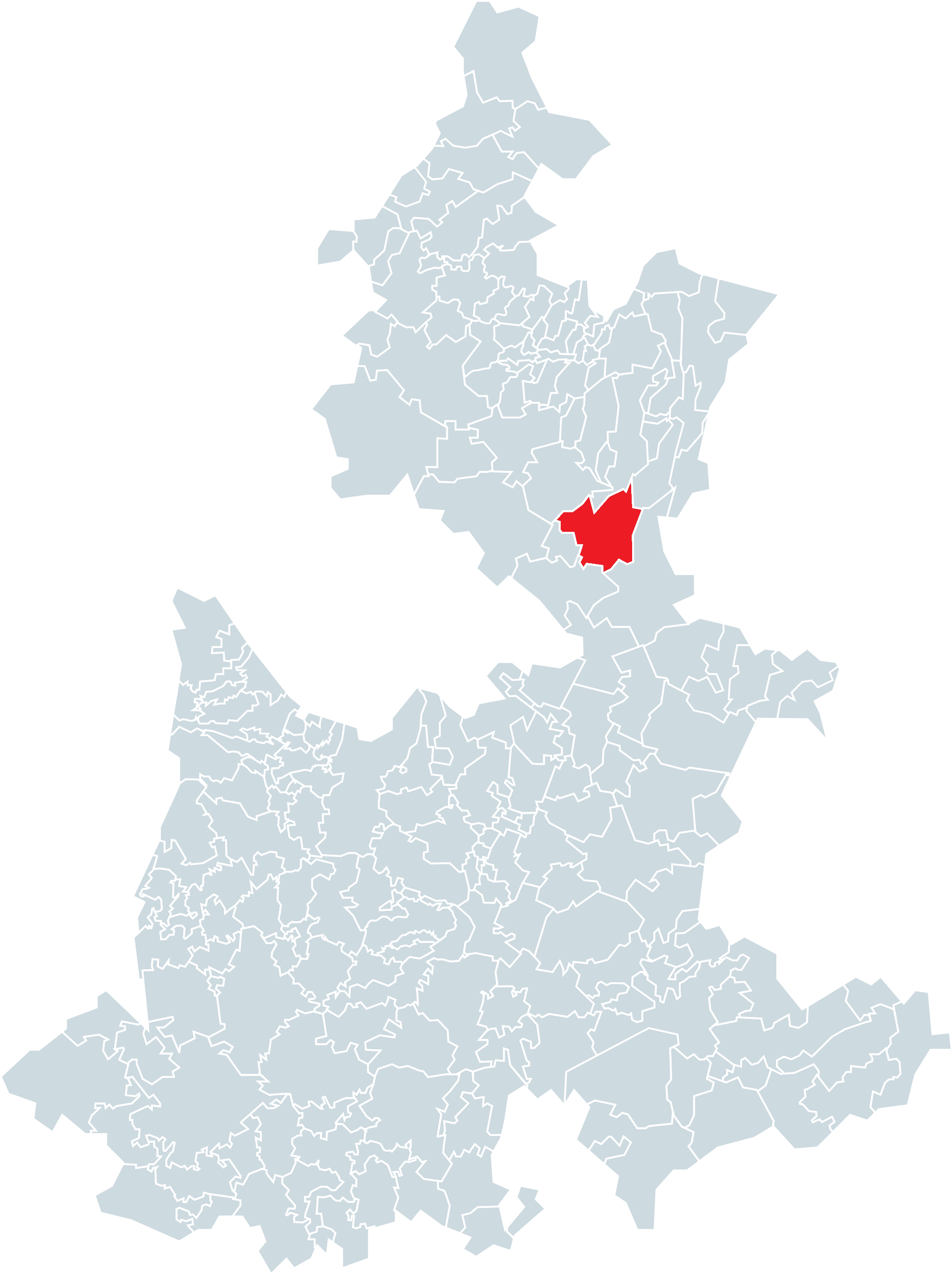 Municipio de Cuyoaco